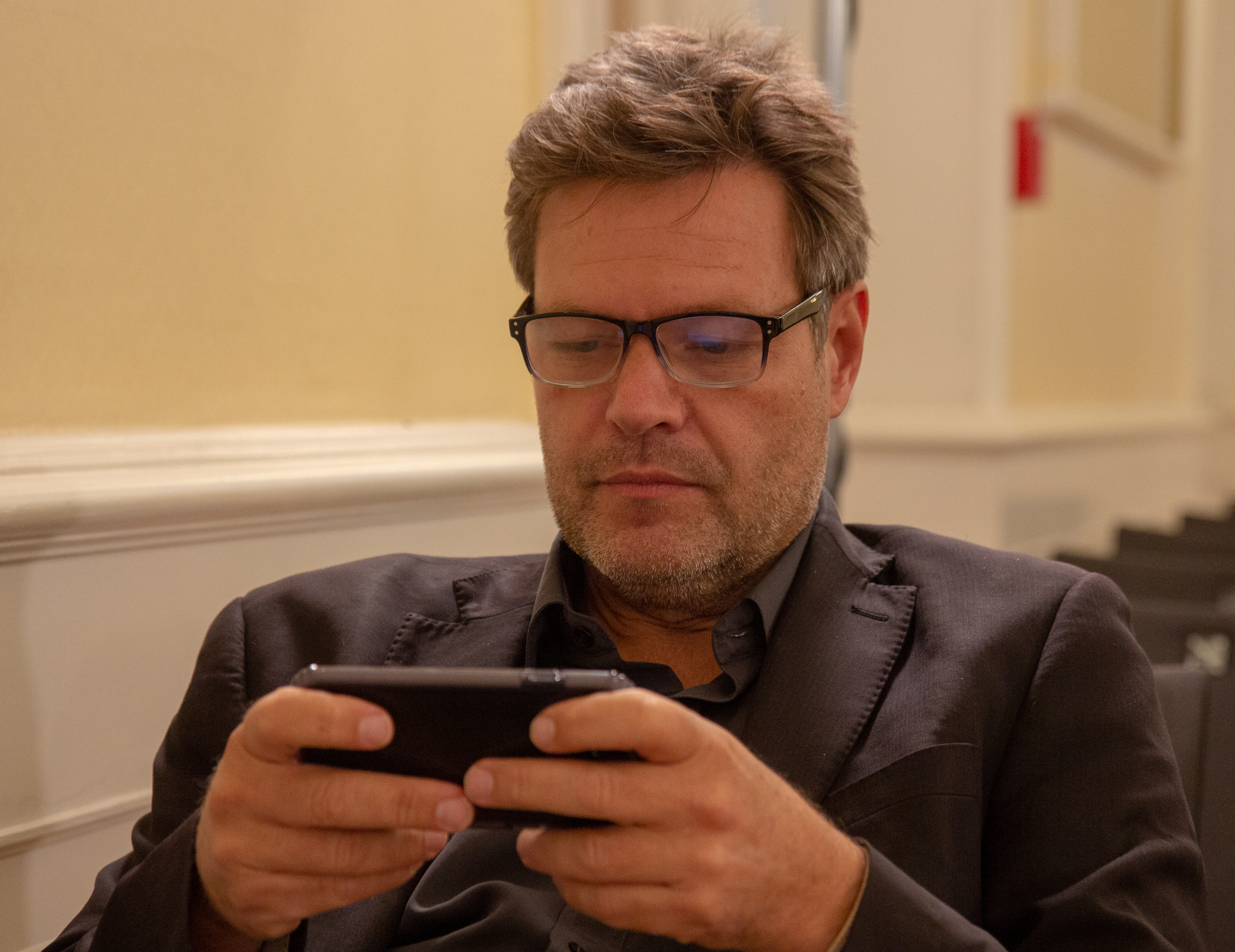 Robert Habeck am 25. September 2018 in Mainz